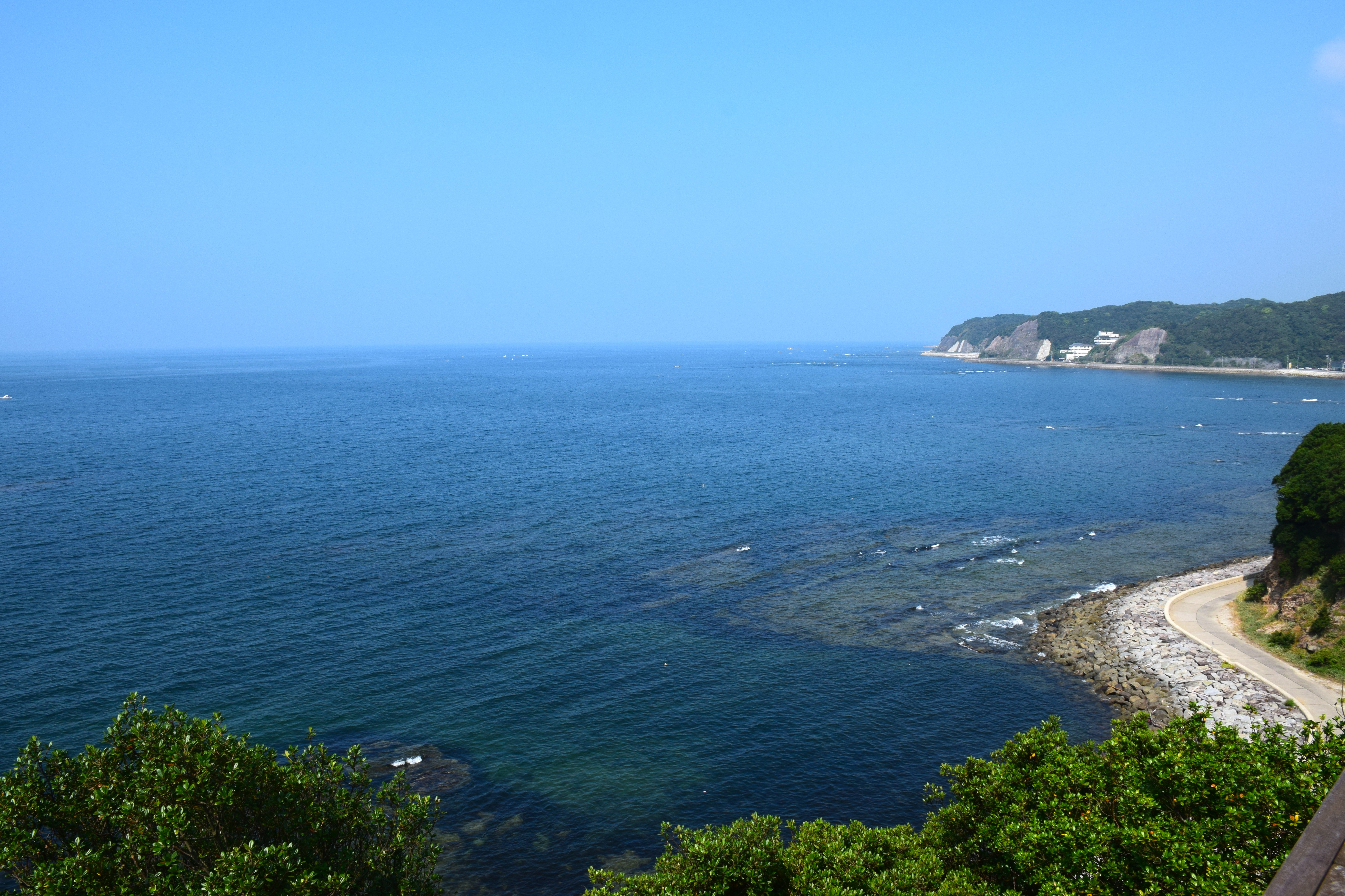 展望台より伊勢湾を望む